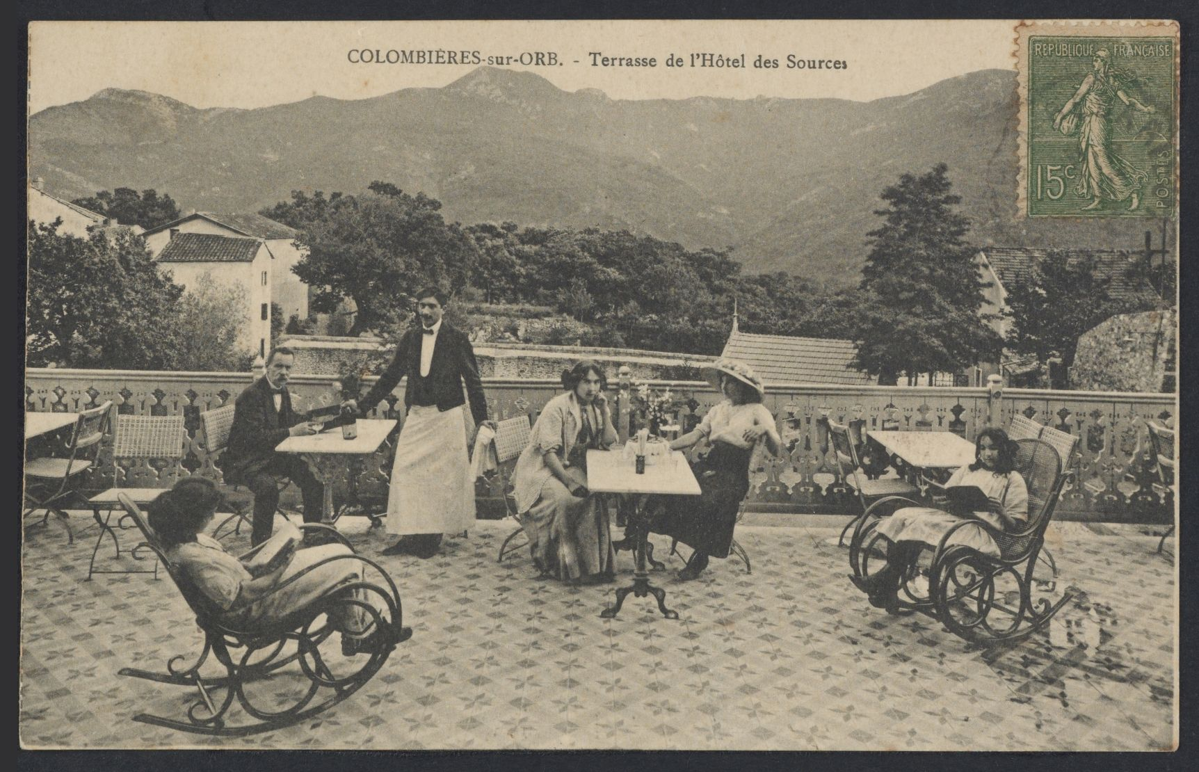 Colombières-sur-Orb. - Terrasse de l'Hôtel des Sources, 1ère moitié du XXe siècle